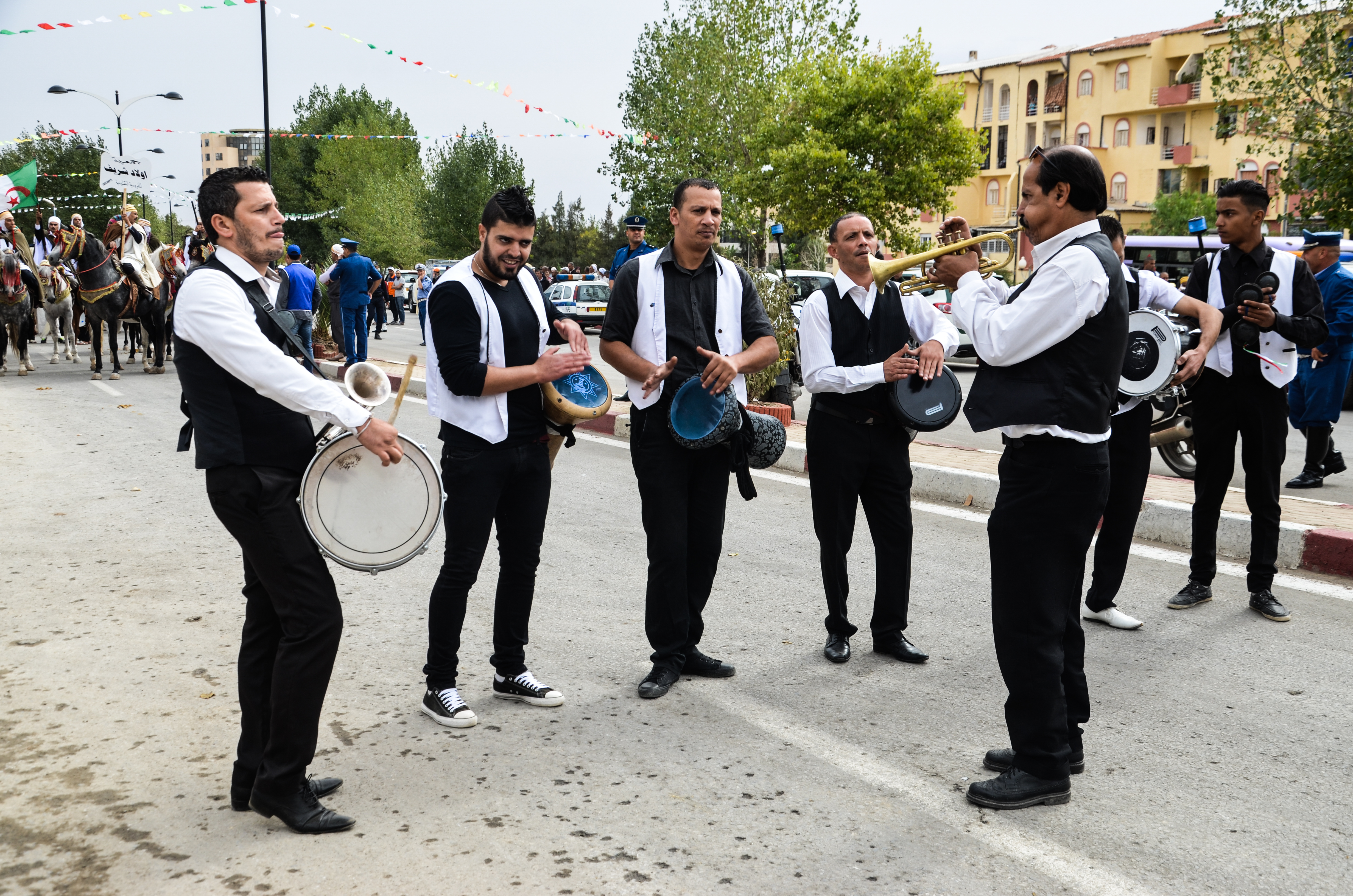 SPECTACLE AU SALON DU CHEVAL 2016 This is an image from Algeria